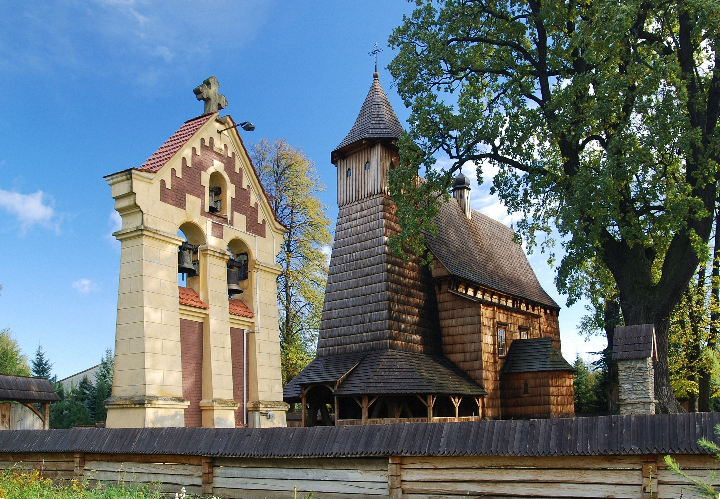 kościół